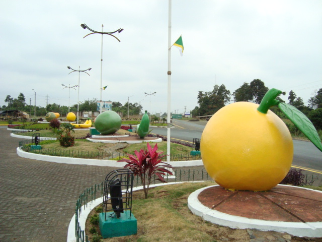 Distribuidor trafico ubicado en el sector sur del cantón Buena Fe